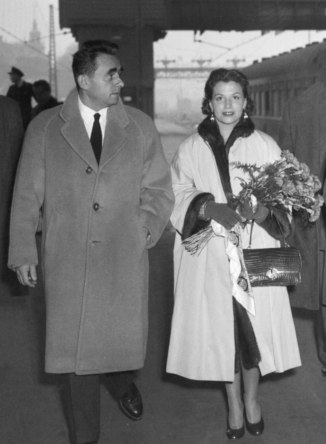 Aankomst op Centraal Station van Henri George Clouzot met zijn vrouw Vera